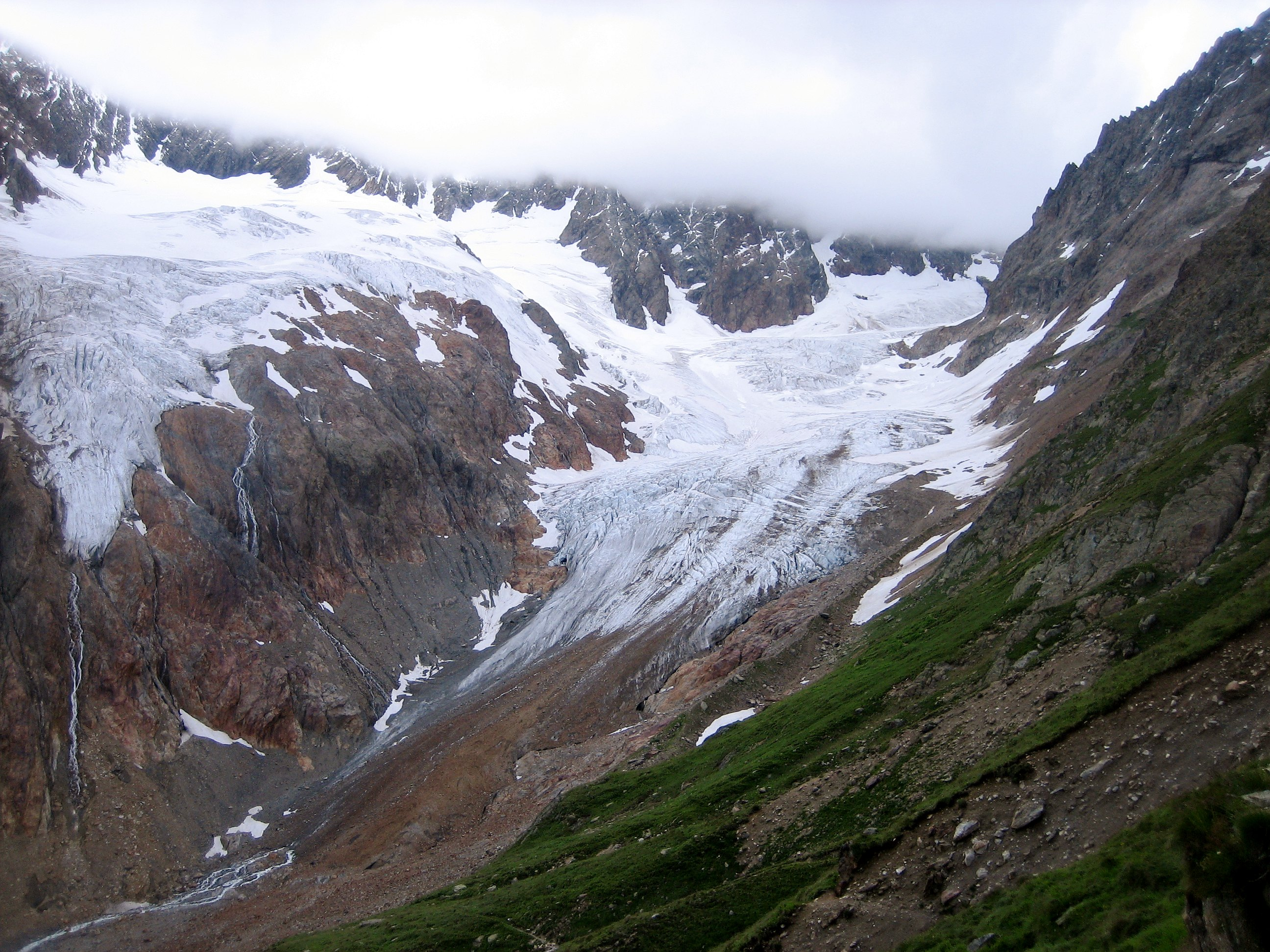 Blick auf den Kehlengletscher